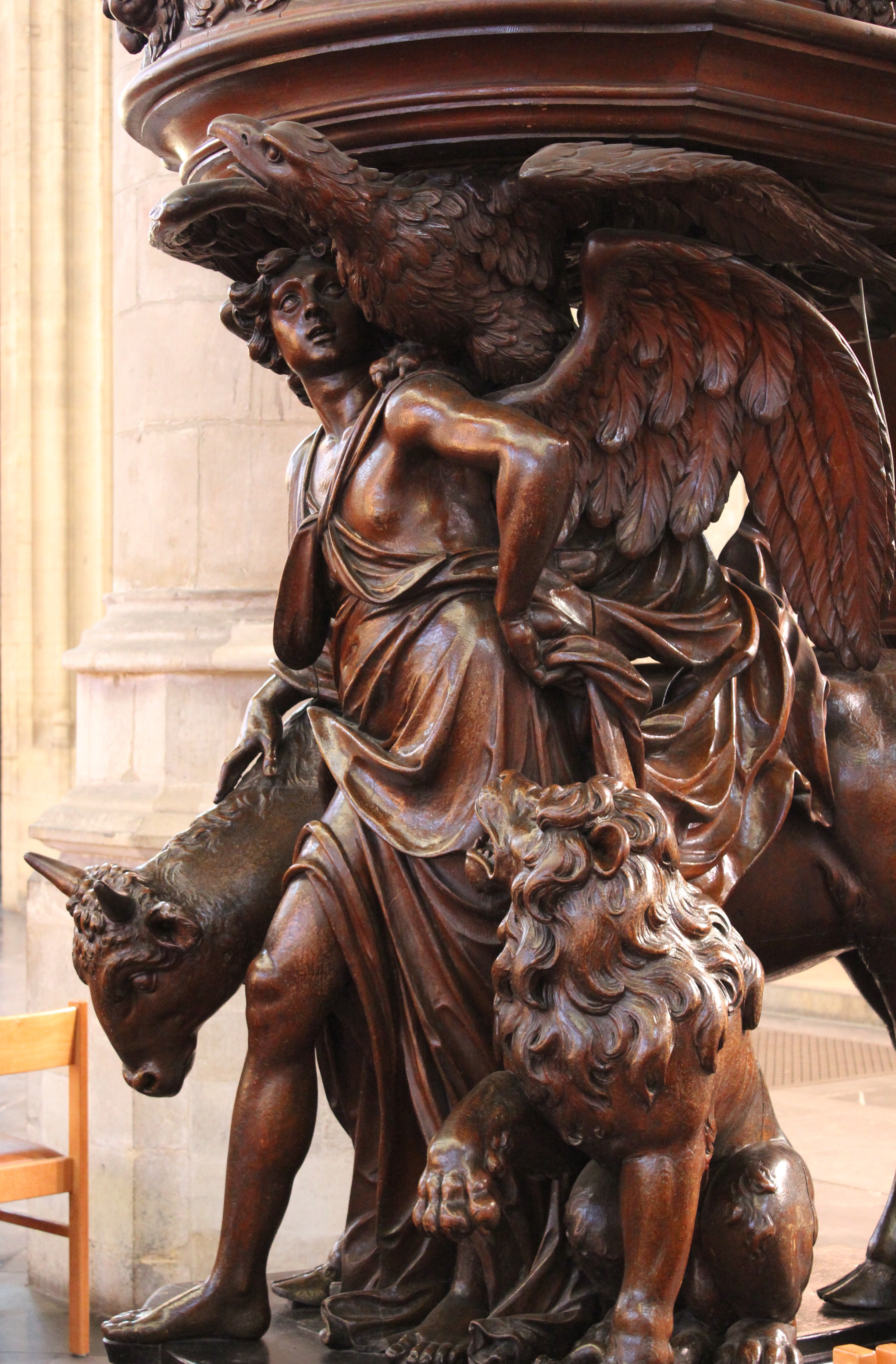 Église Notre-Dame du Sablon, Bruxelles, Belgique. Détail de la chaire de vérité, soutenue par les figures symboliques des quatre évangélistes : l'ange, l'aigle, le lion et le boeuf. Oeuvre de Marc de Vos (1697)